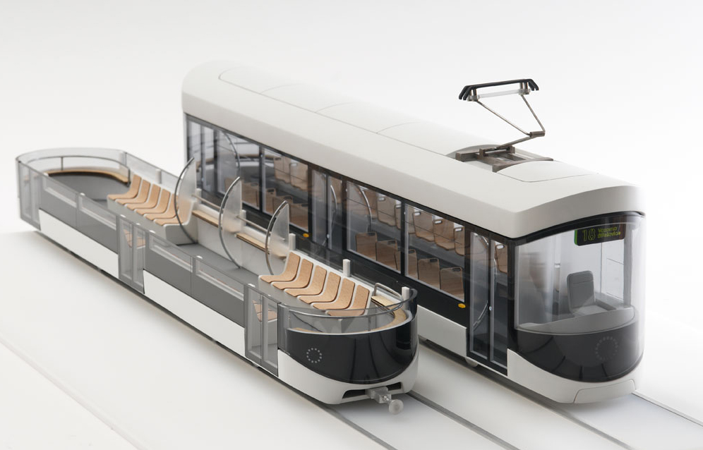 Návrh Tramvaj pro Prahu designerky Anny Marešové